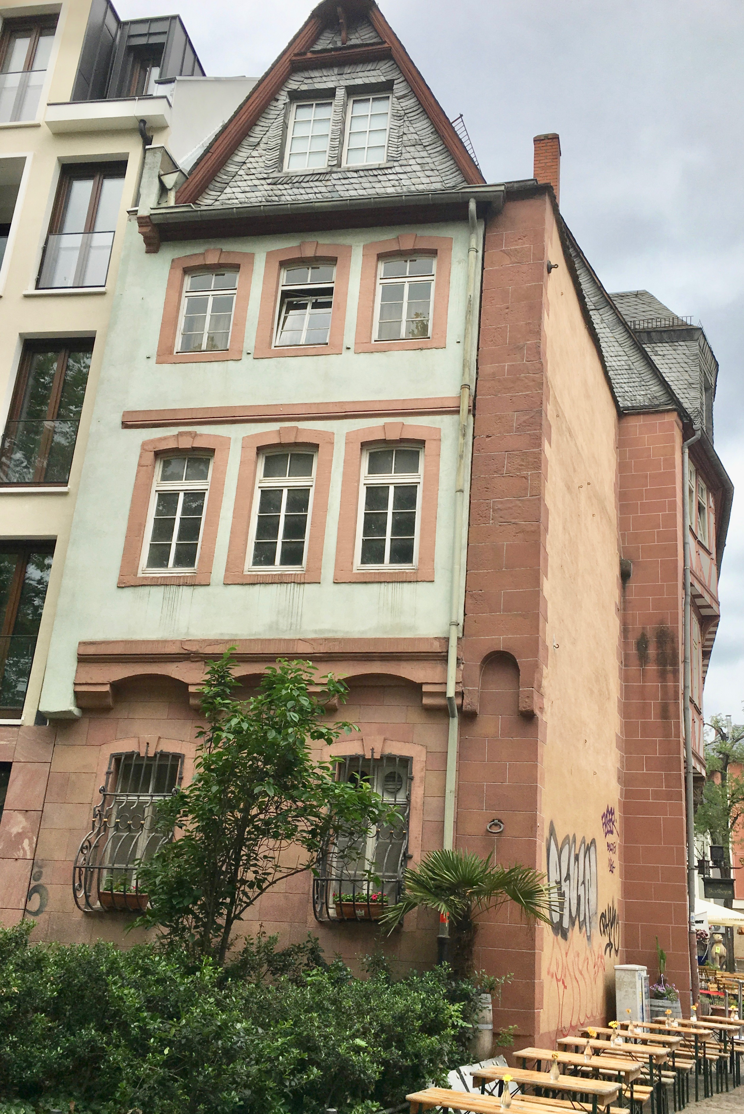 Haus Wertheim am Fahrtor, Frankfurt am Main Der südliche Anbau hieß ursprünglich Haus Badstube